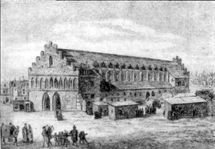 Gotyckie sukiennice do 1555 roku